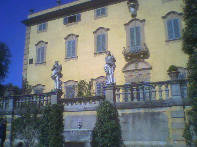 View in Villa La Pietra Garden in Florence, italy